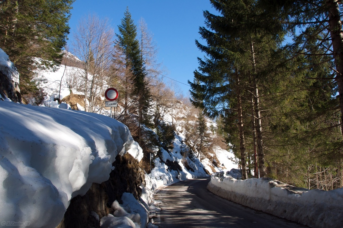 Furlan: La strade par "lâ in denti" viars Pradibosc